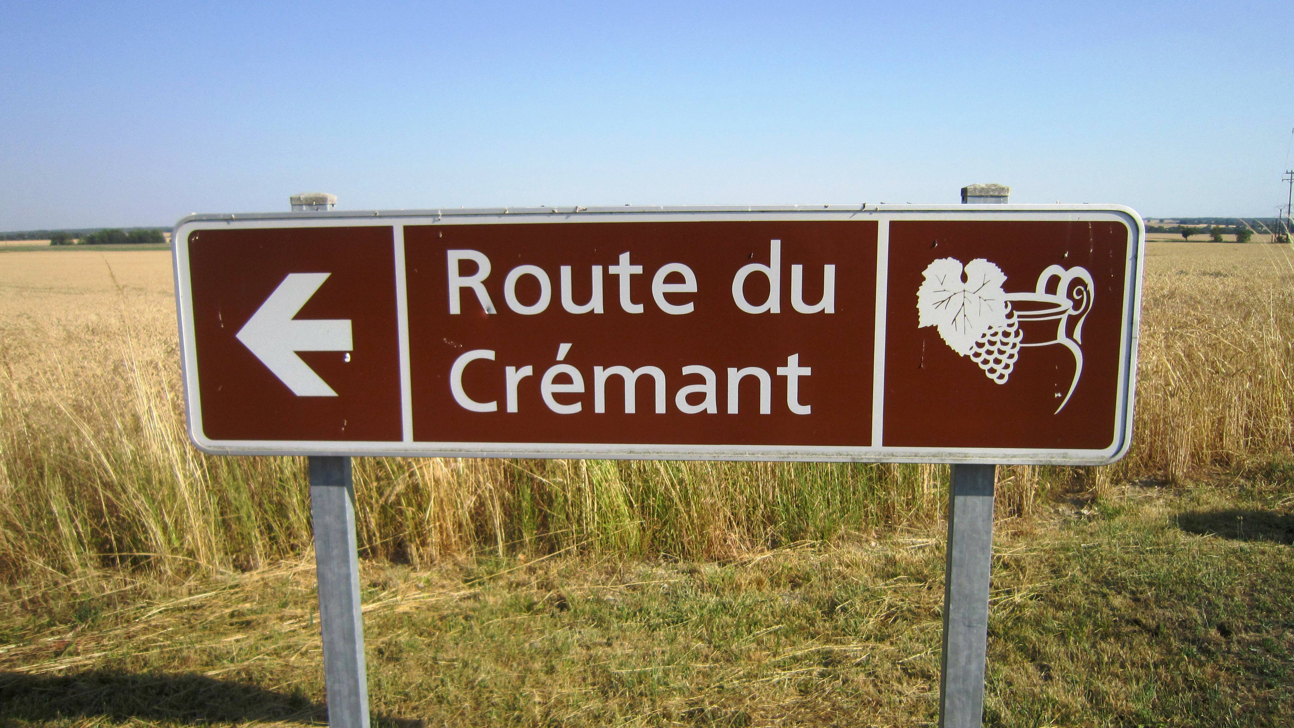 Signalétique de la route du crémant en Côte-d'Or